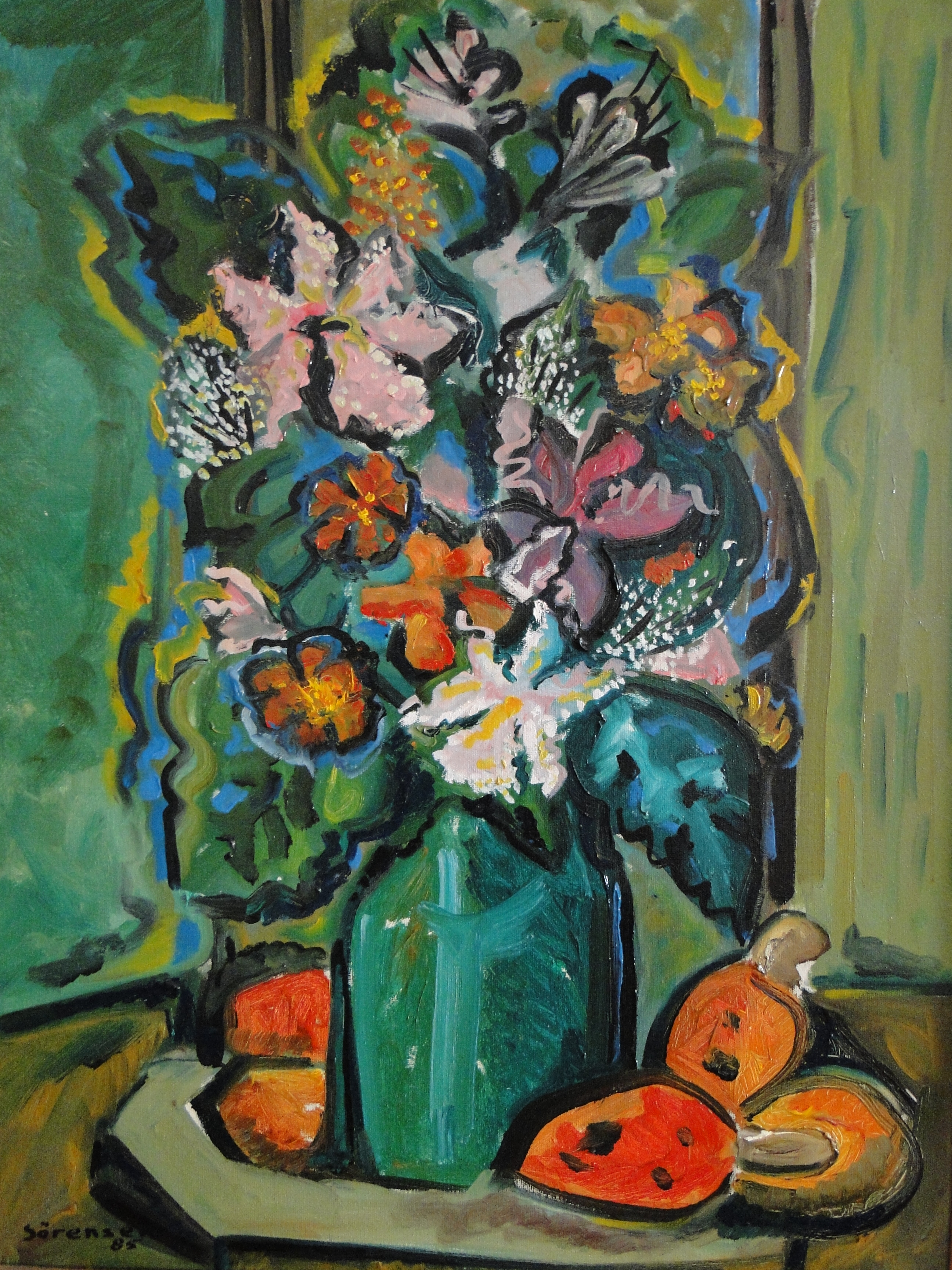 Artista: Carlos Haraldo Sörensen Meio: Óleo sobre Tela. 90 x 75 cm Nome: Vaso de Orquídeas Data: 1985